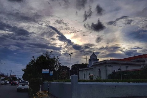 Iglesia de San Juan, ciudad cabecera del cantón de Tibás.